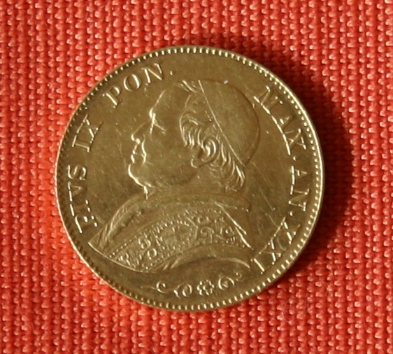 20 Lire Goldmünze Kirchenstaat Pius IX aus 1866